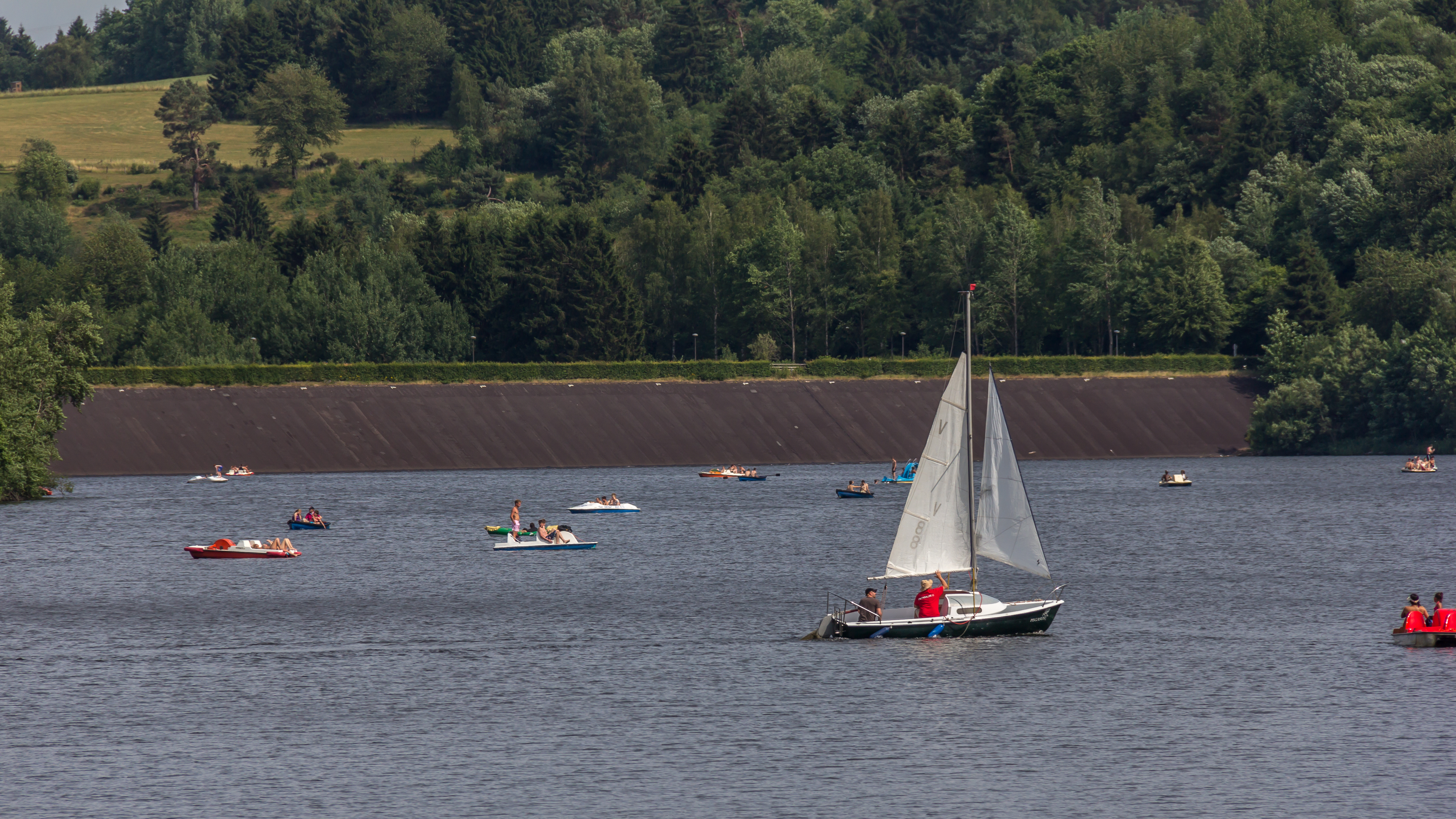 Kronenburger See mit Staumauer